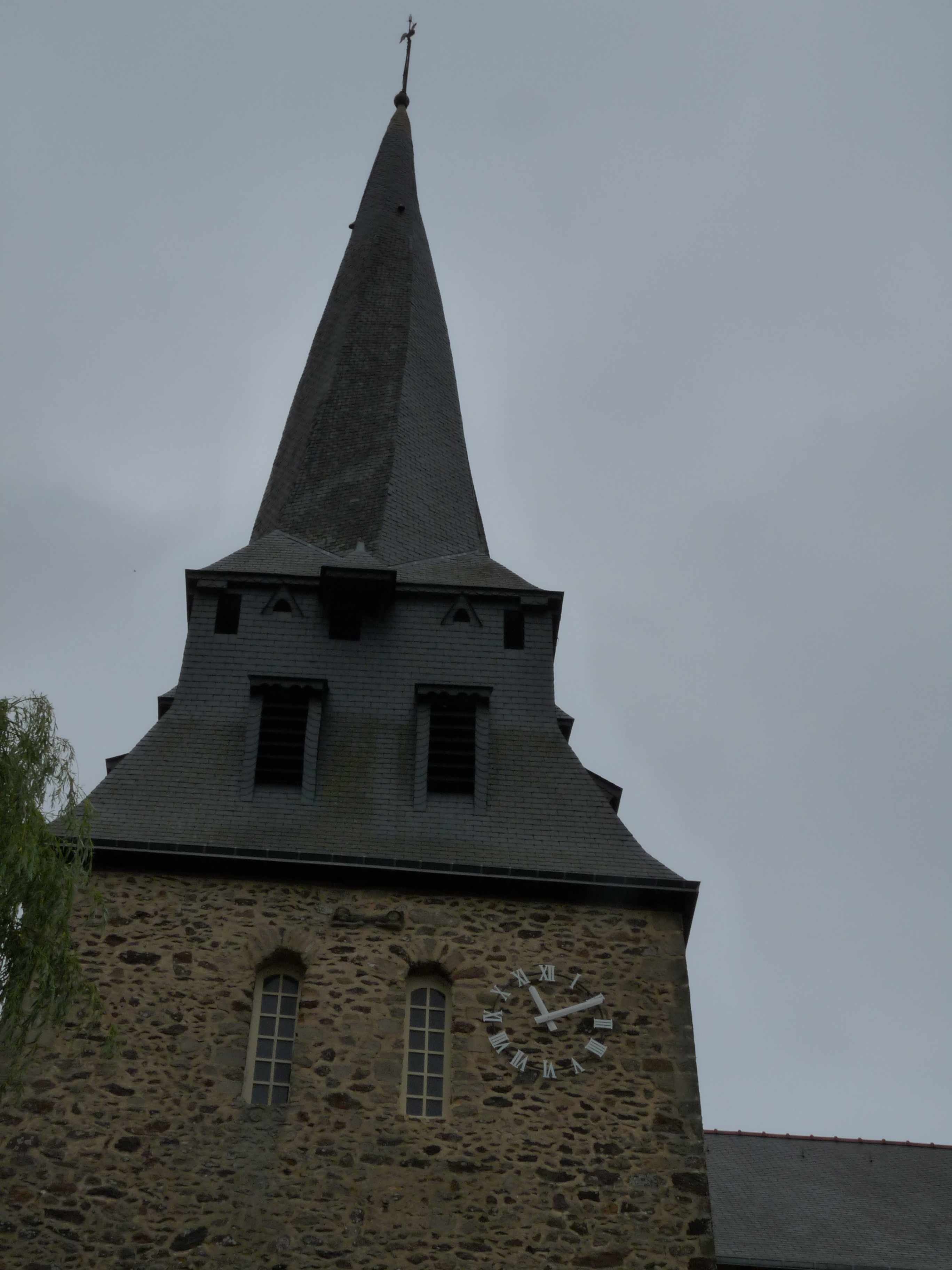 le clocher de l'église de Meslay-du-Maine qui est un clocher tors